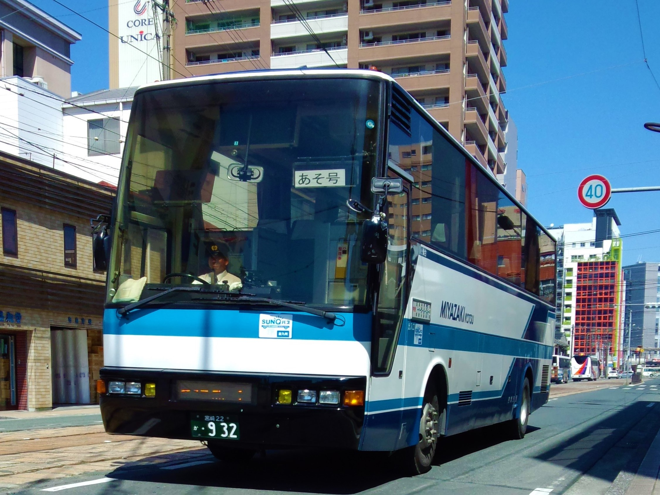 いすゞ・スーパークルーザー（U-LV771R）、宮崎交通で長距離路線用として使用される車両。熊本市中央区山崎町にて撮影